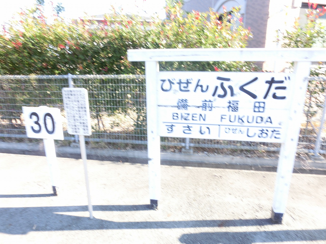 備前福田駅の駅標 岡山県道703号備前柵原自転車道線 旧同和鉱業片上鉄道 岡山県